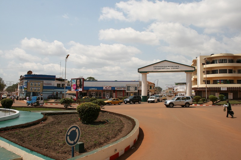 Bangui Shopping District